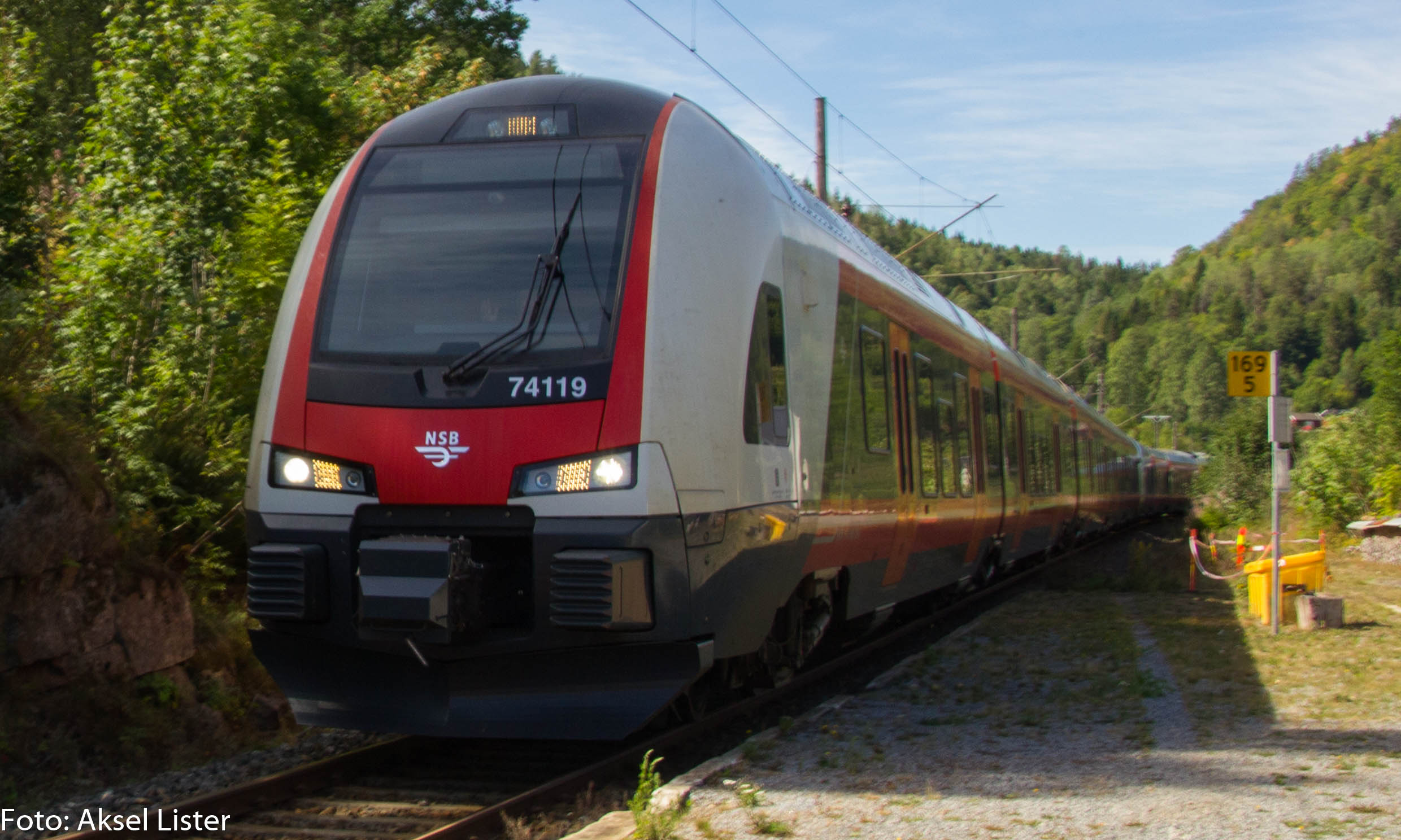 BM 74-19 passerer Kjose på nest siste driftsdag.